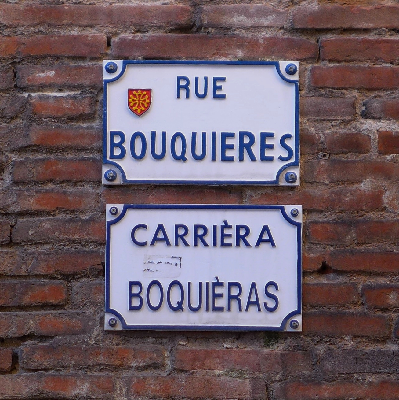 Rue Bouquières - Toulouse (plaque de rue)